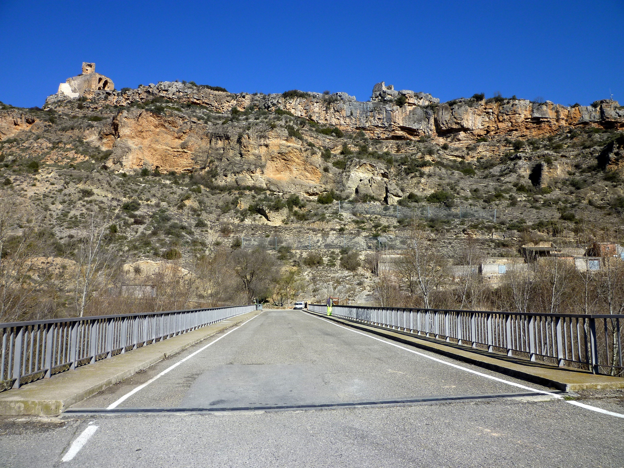 El pont nou d'Alòs de Balaguer (Noguera) This is a a photo of a natural area in Catalonia, Spain, with id: ES510077